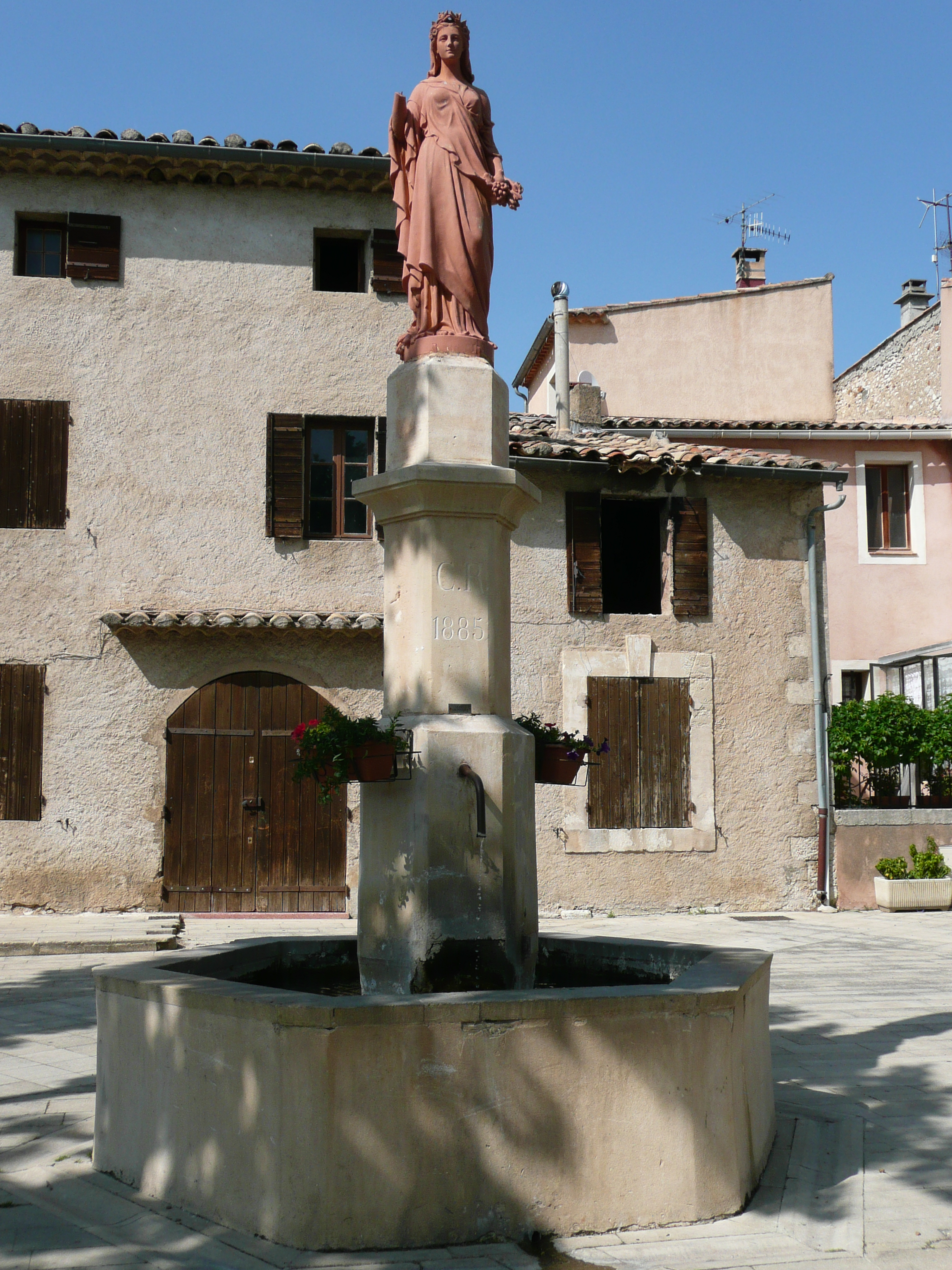 Fontaine de Villars dans le leberon